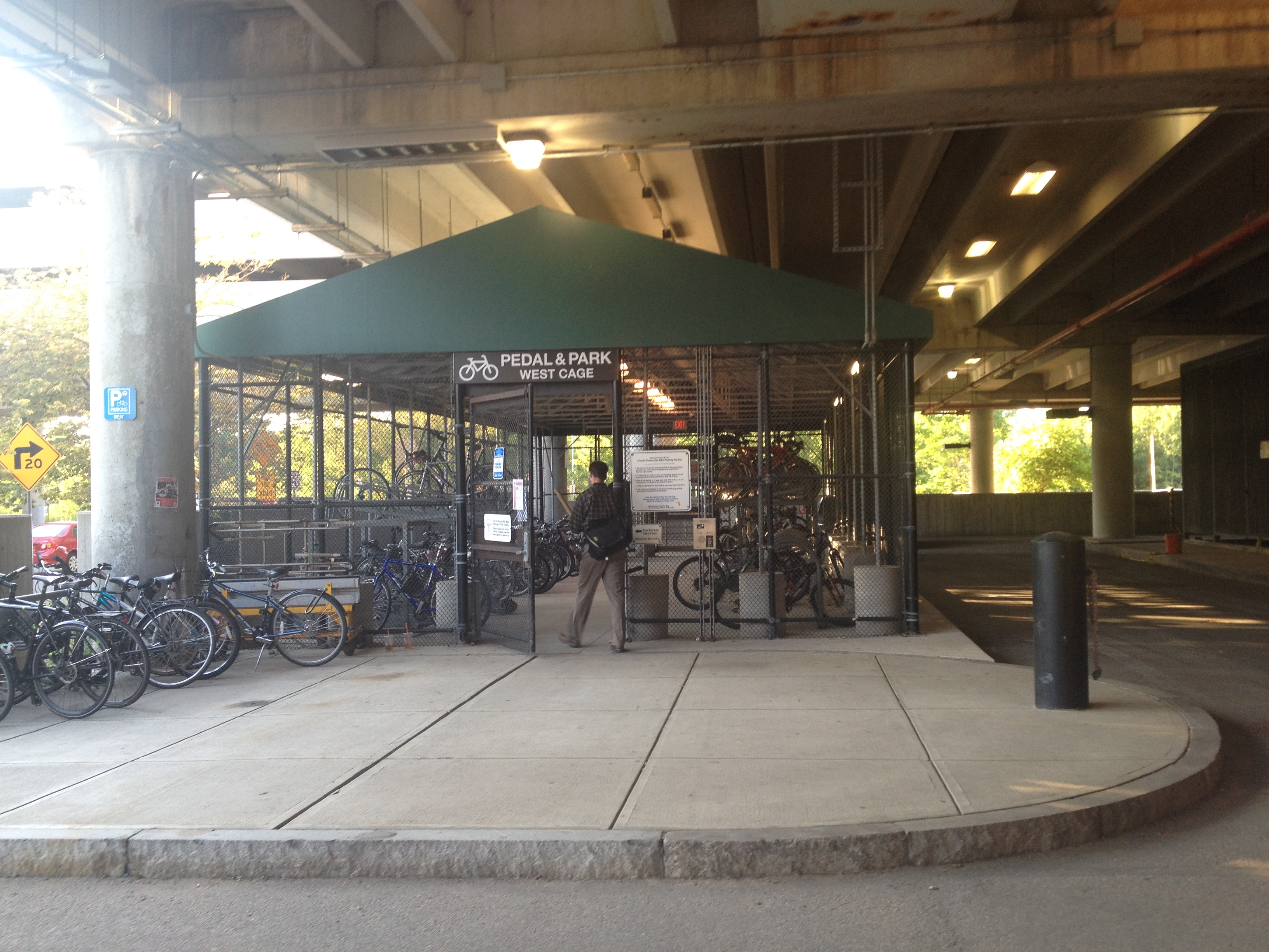 MBTA Pedal & Park cage for bike parking